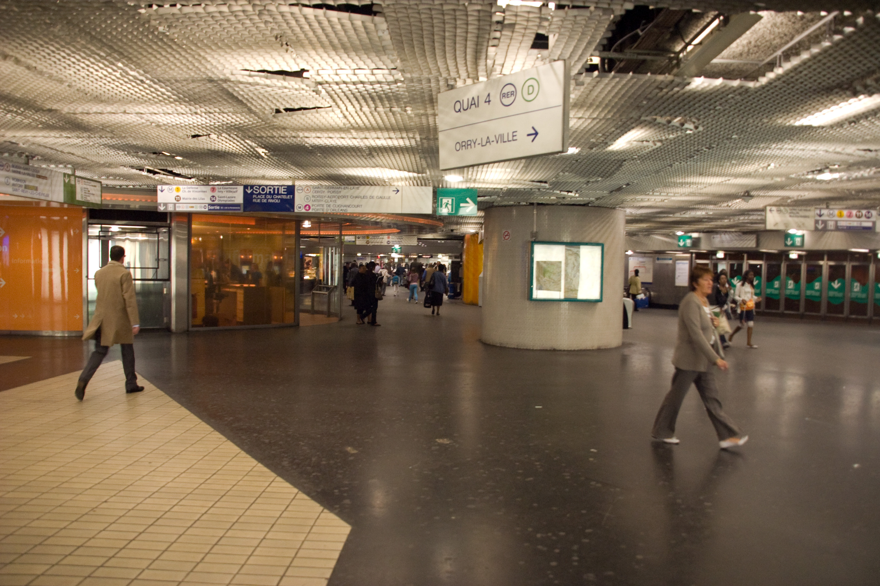 Station Châtelet - Les Halles, Paris, France